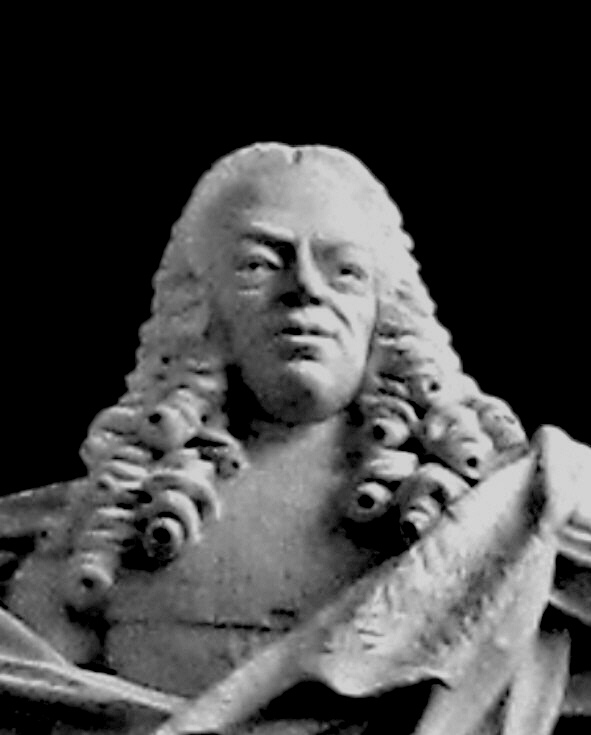 Epitaph-Büste des Lübecker Bürgermeisters Andreas Albrecht von Brömbsen (* 22. Juni 1703; † 1. Juli 1757)